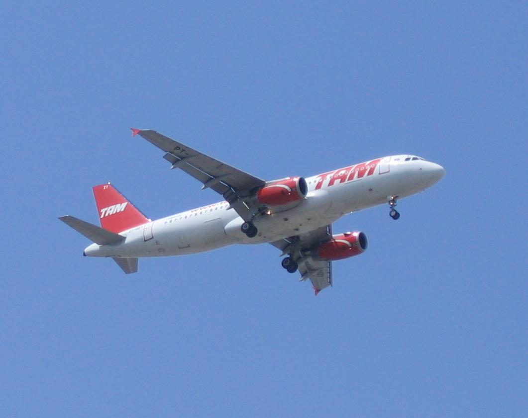 TAM Airbus